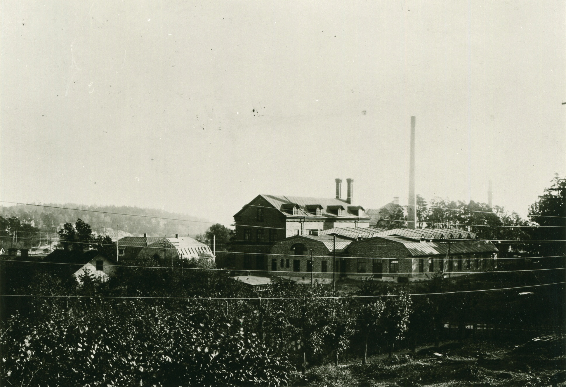 Fredfors Fabrik, Mariehäll. I förgrunden Mariehälls trädgård.